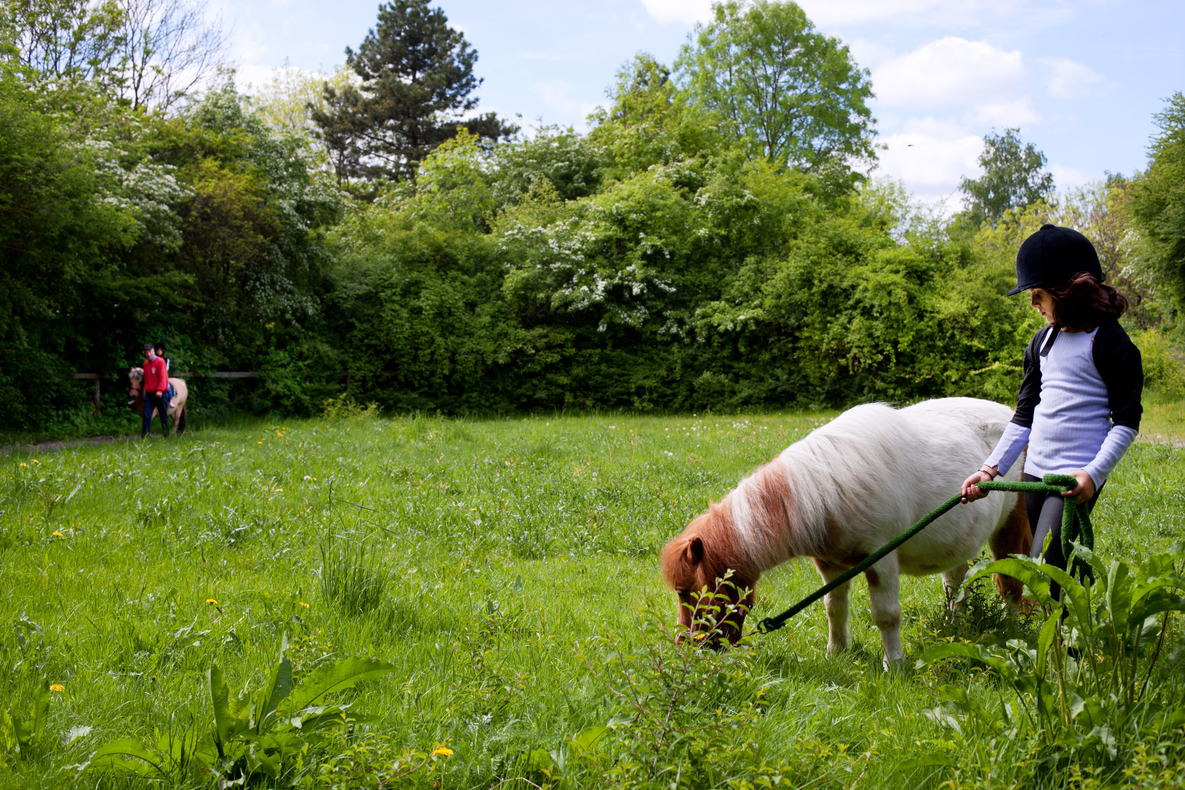 Urbanplanen